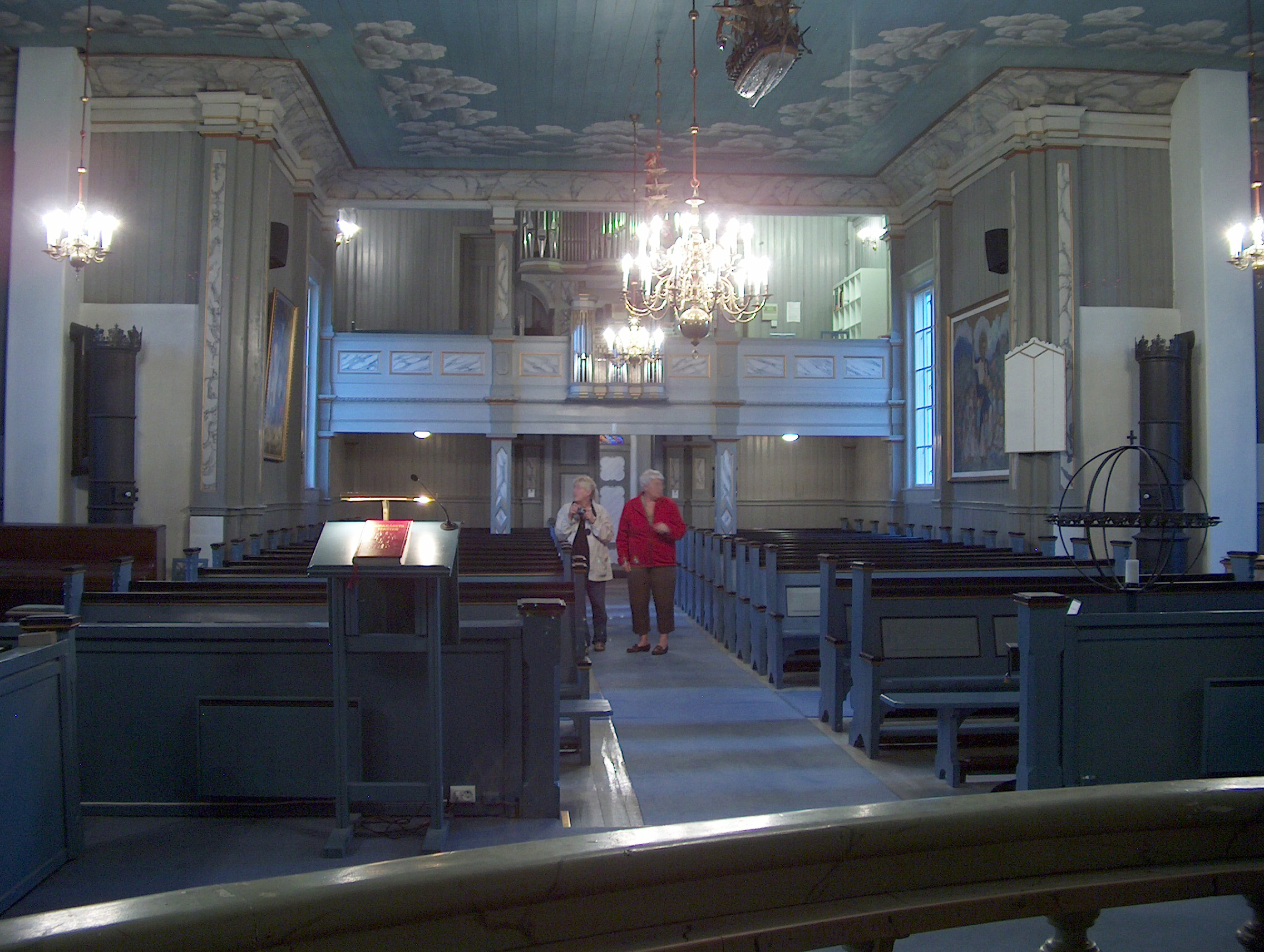 Lunder kirke, Sokna (interiør i skipet)